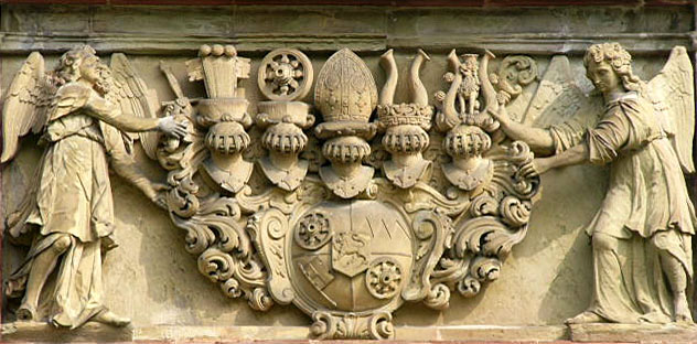 Wappendarstellung eines von Schönborn mit den Hoheitssymbolen der Bistümer Mainz und Würzburg an einem Tor der Würzburger Festung Marienberg